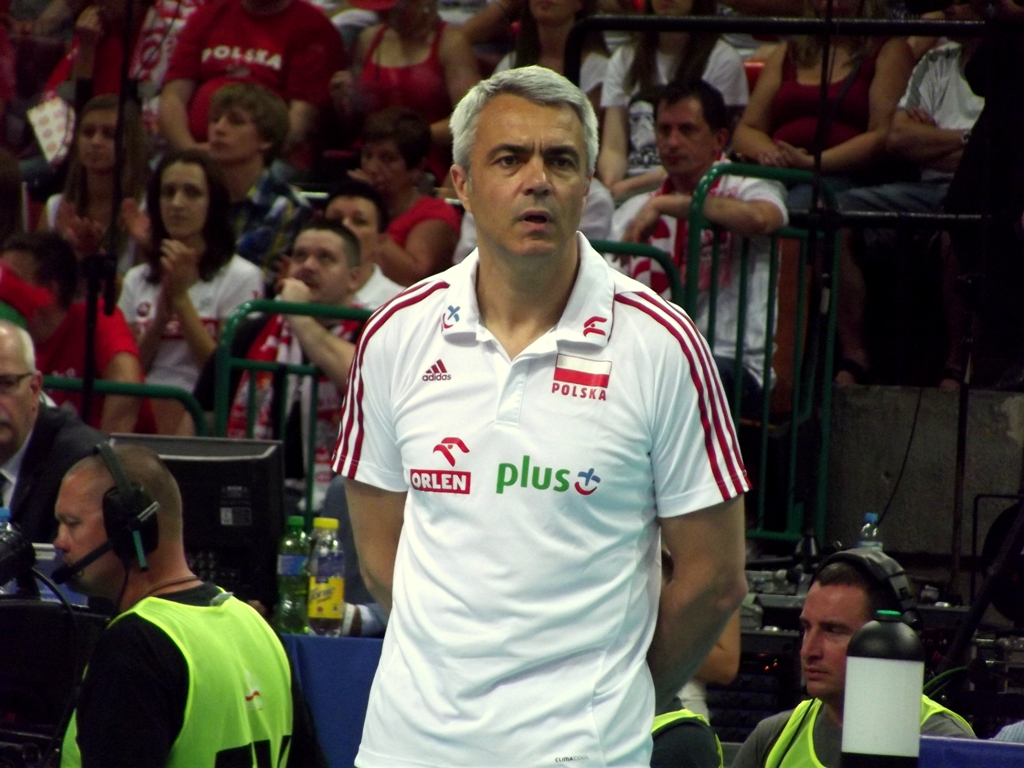 Zdjęcie zrobione podczas meczu Polska - USA siatkarskiej Ligii Światowej w katowickim Spodku.